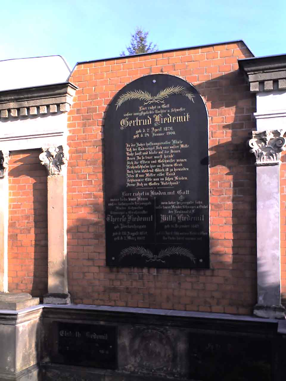 Friedhof Pankow IV: Familiengrab des Stifters des Friedhofs mit Erbrecht